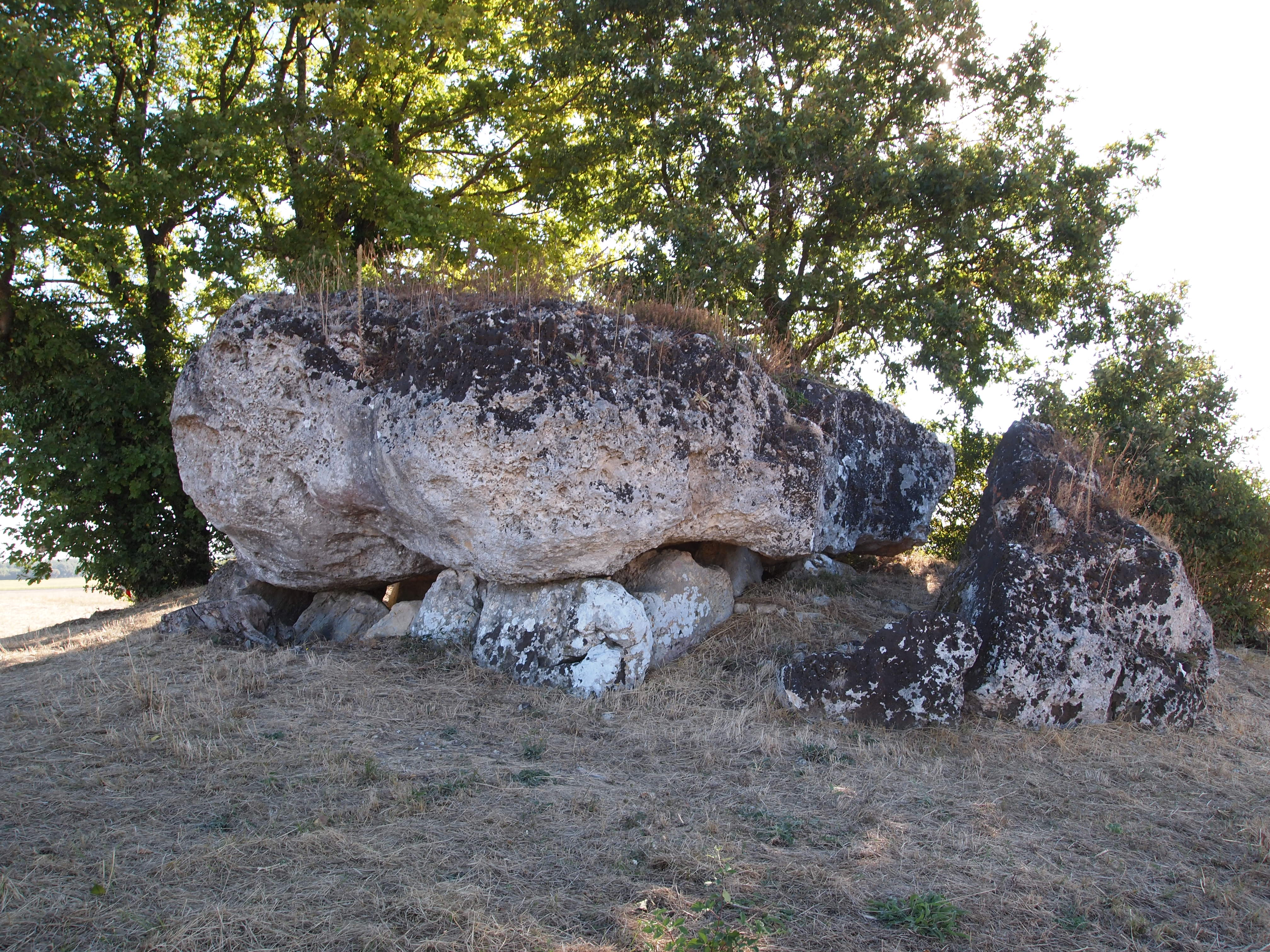 Tumulus de la Folatière, à Luxé en Charente (classé, 1957)